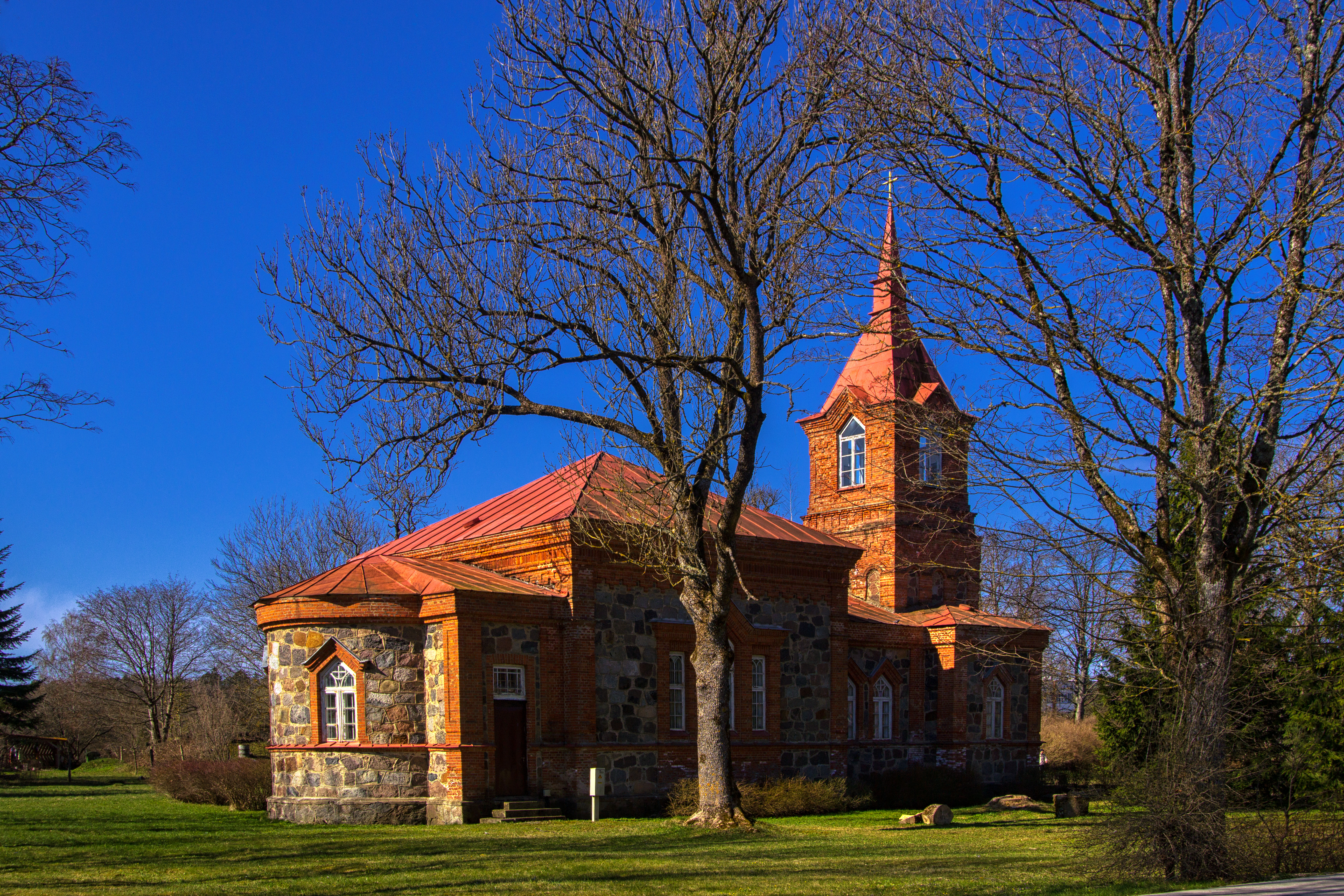 Aizputes adventistu (bijusī pareizticīgo) baznīca